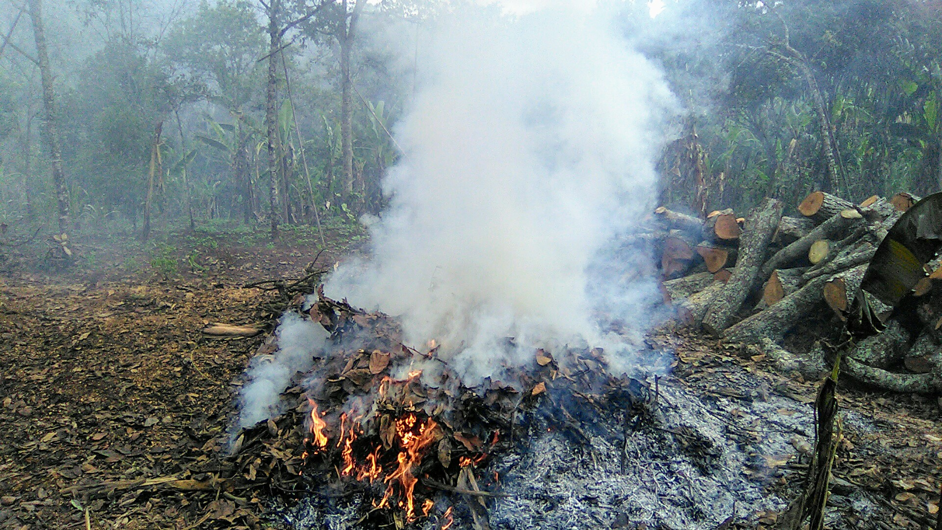 Les arbres sont systématiquement coupés à l'aide de tronçonneuses ou par le feu soit pour obtenir du bois de chauffage ou des terres cultivables. Une épaisse fumée se répand dans l'air et contribue à la pollution de celui-ci.